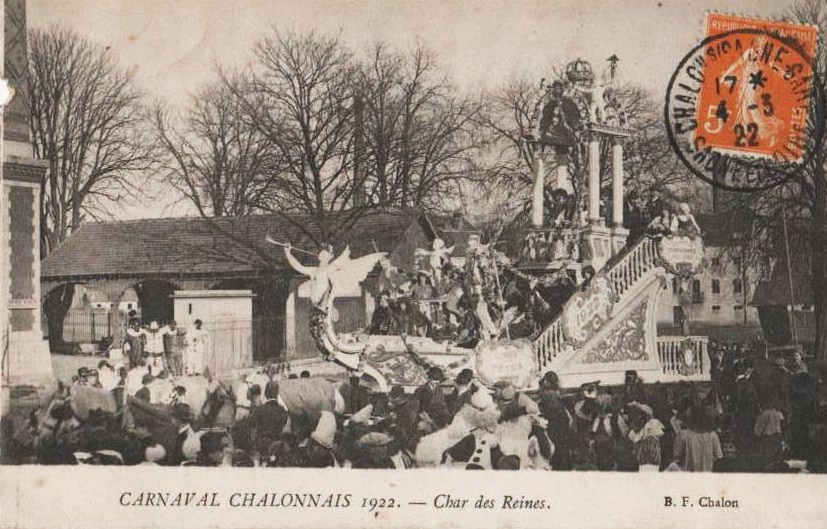 Le char des reines à la Mi-Carême 1922 à Chalon-sur-Saône. Il s'agit du remploi du char de la Reine des Reines de Paris 1911.